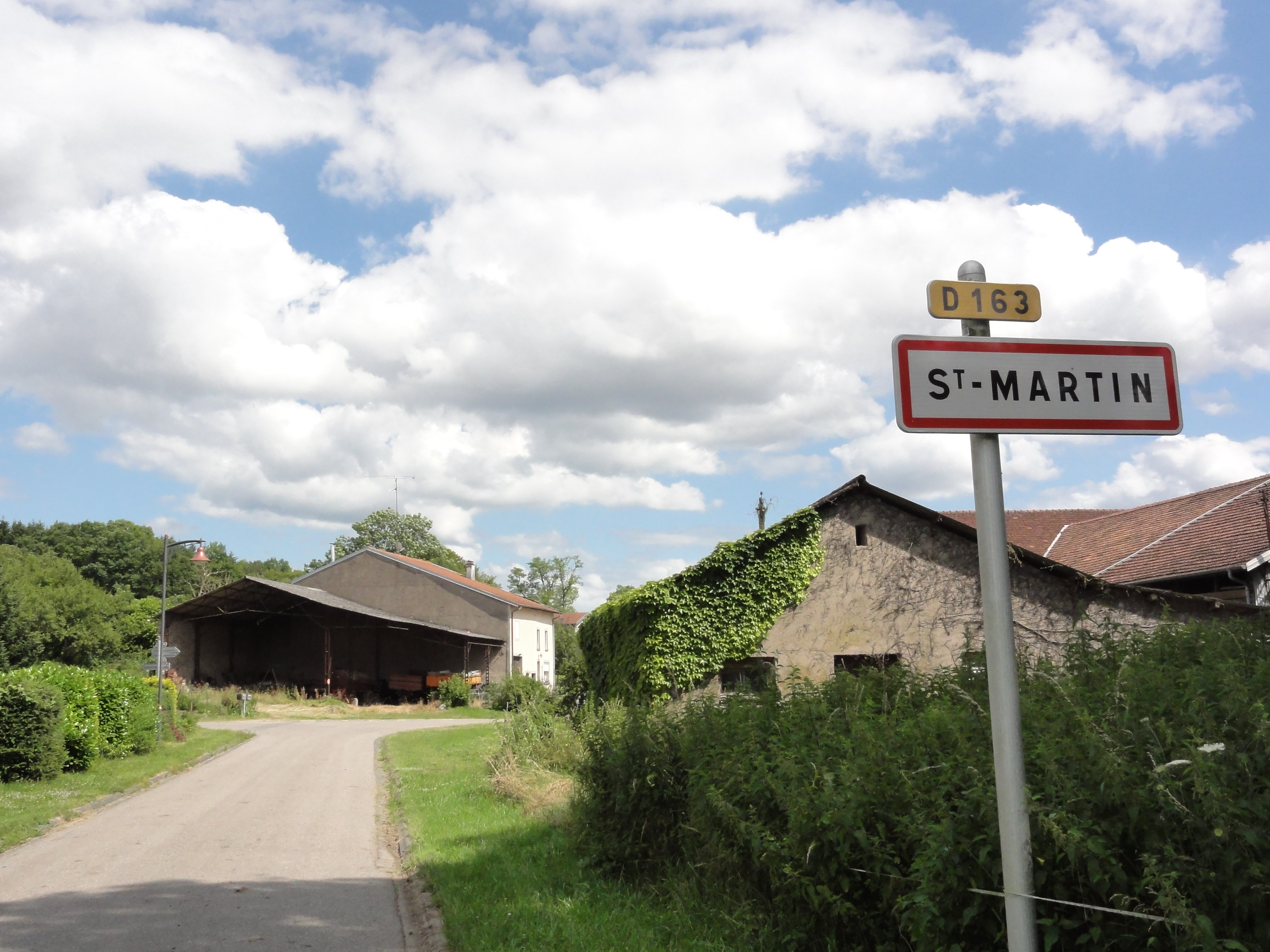 Saint-Martin (M-et-M) city limit sign